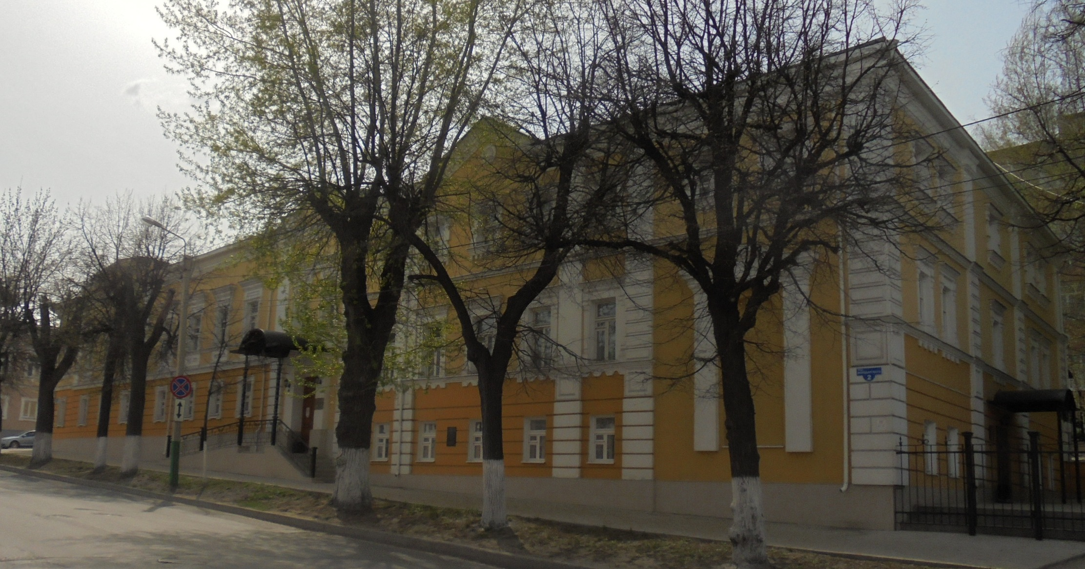 Дом Столыпиных (дом, в котором в 1817-1818 гг. жил М.Ю. Лермонтов): улица Володарского, 2, Пенза, Пензенская область